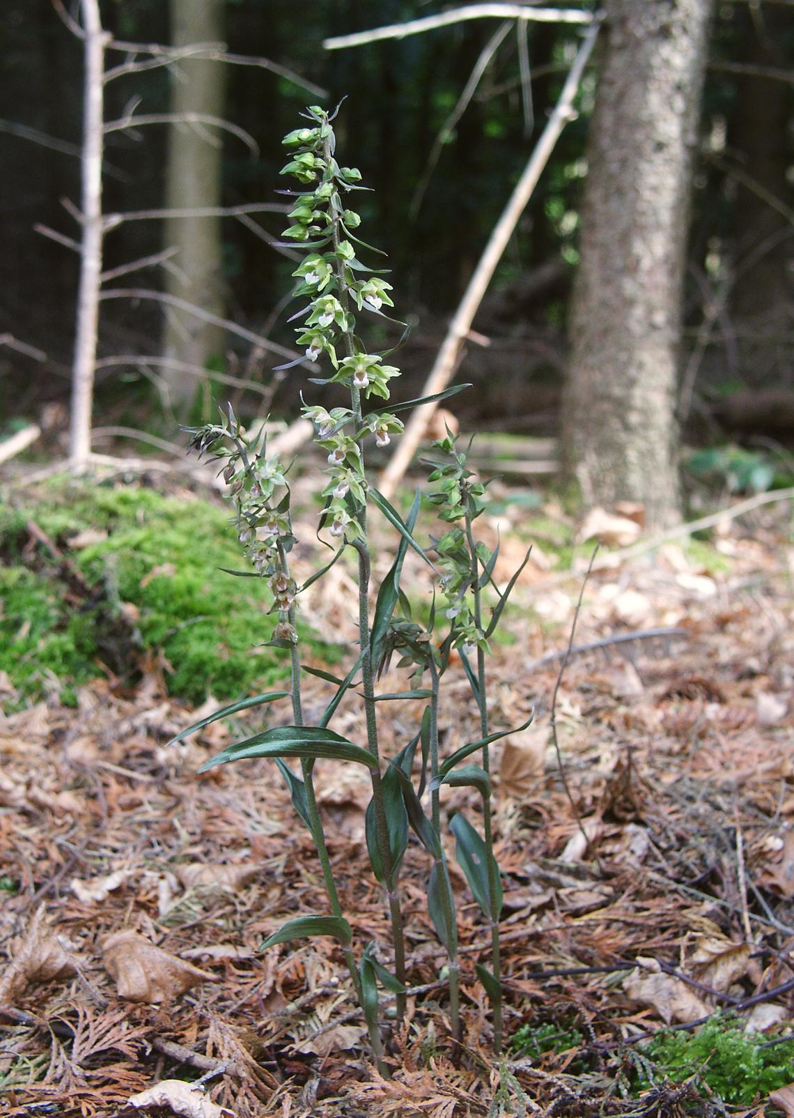 Epipactis purpurata, Schwäbisch-Fränkische Waldberge, Germany